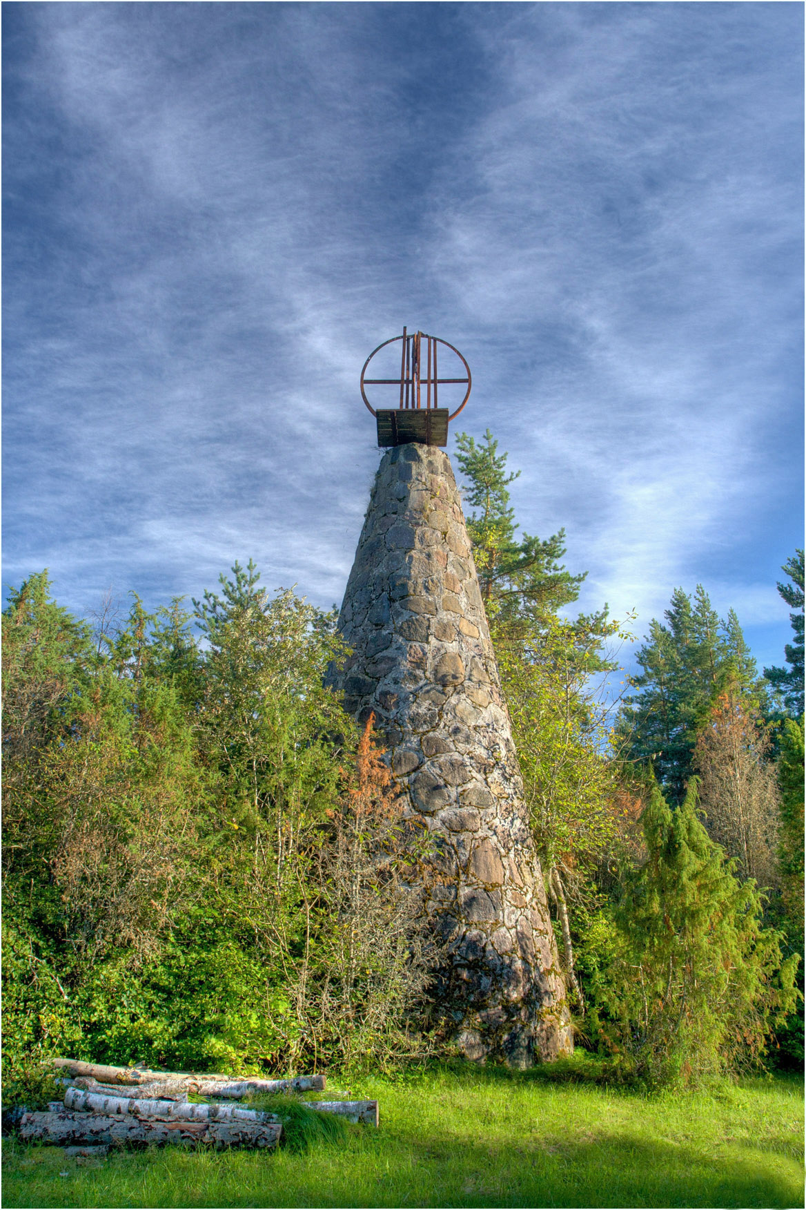 Telisna ülemine päevamärk